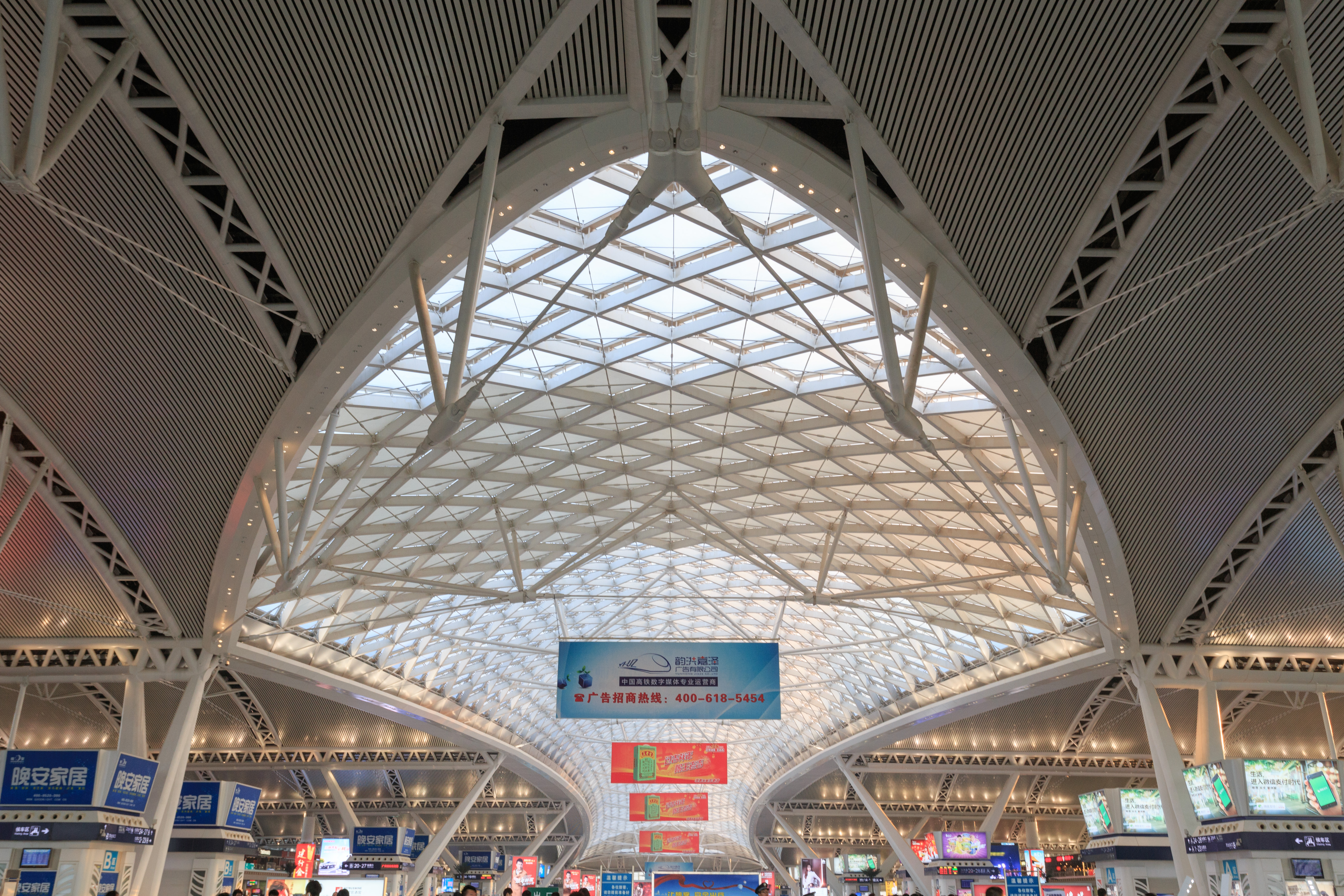 广州南站